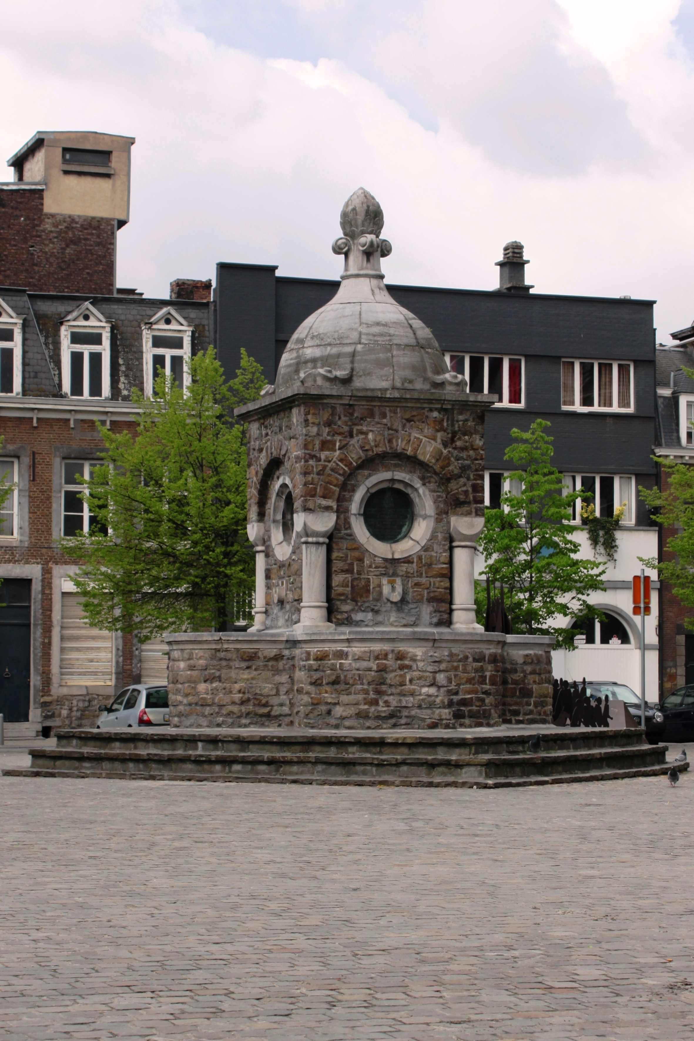 Monument Dieudonné Lambrecht à la place Saint-Barthélmy à Liège